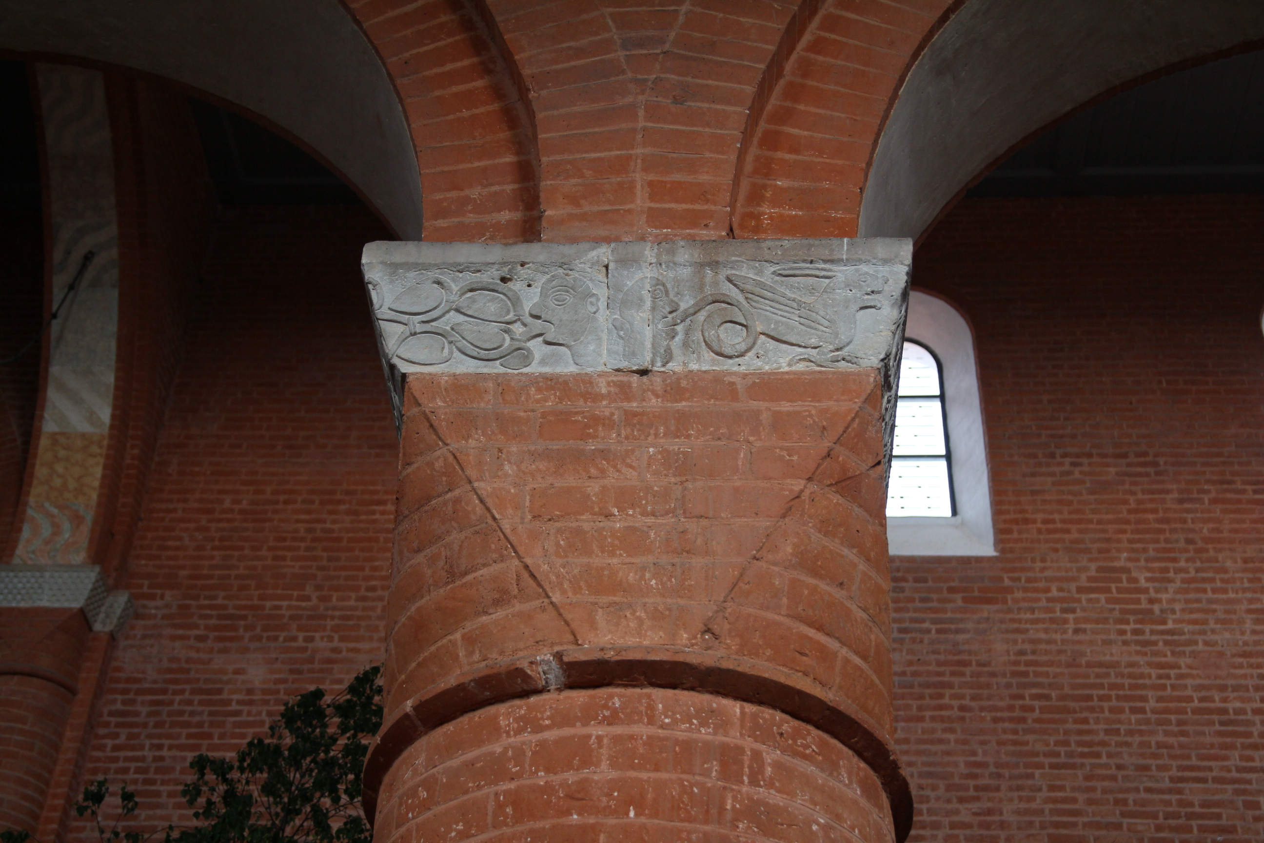 Romanisches Trapezkapitell aus Backstein mit Kalksteinkämpfer in der Klosterkirche Jerichow.